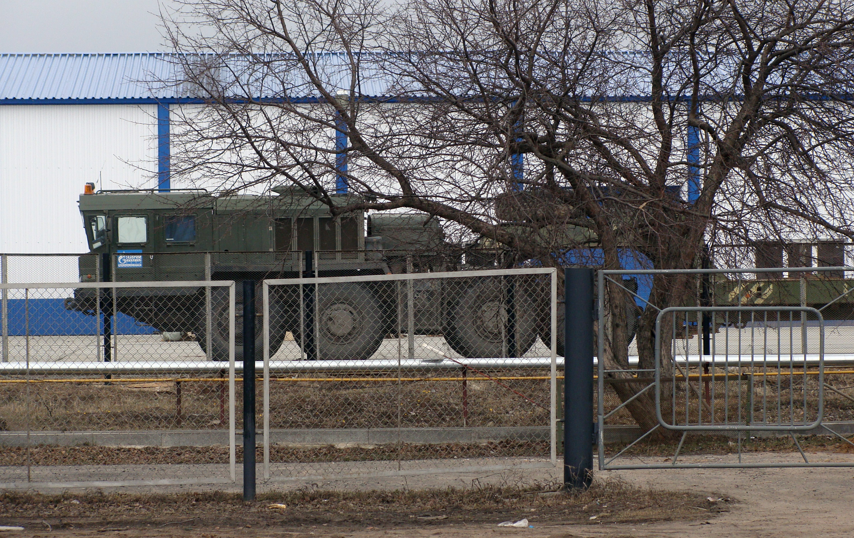 Седельный тягач Русич